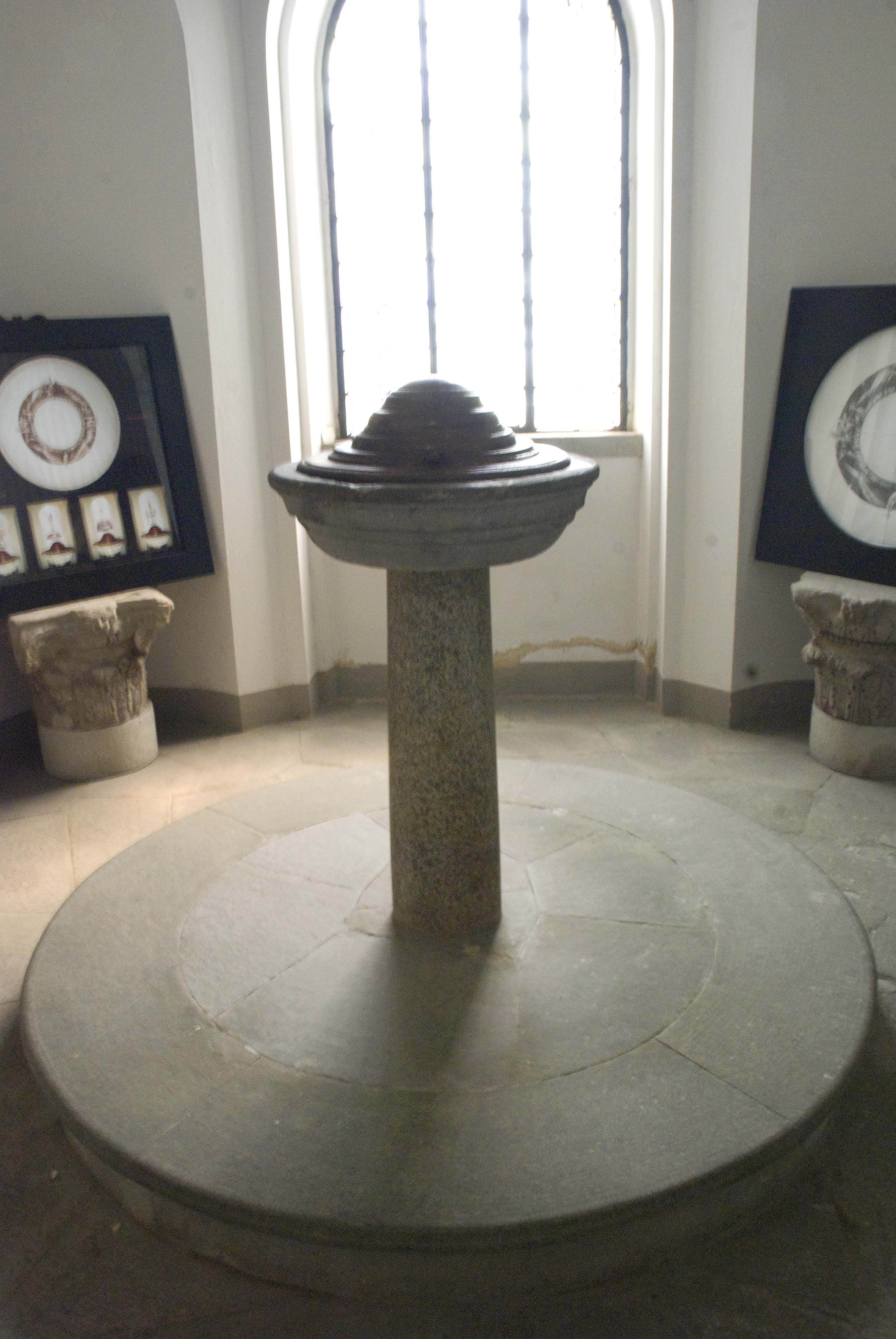 Fonte battesimale di Leonardo da Vinci situato nella chiesa della Santa Croce (Vinci)